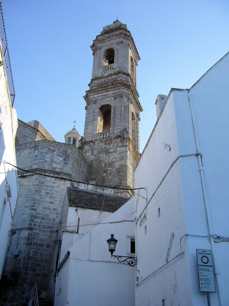 Locorotondo, il campanile della chiesa madre di San Giorgio Martire.